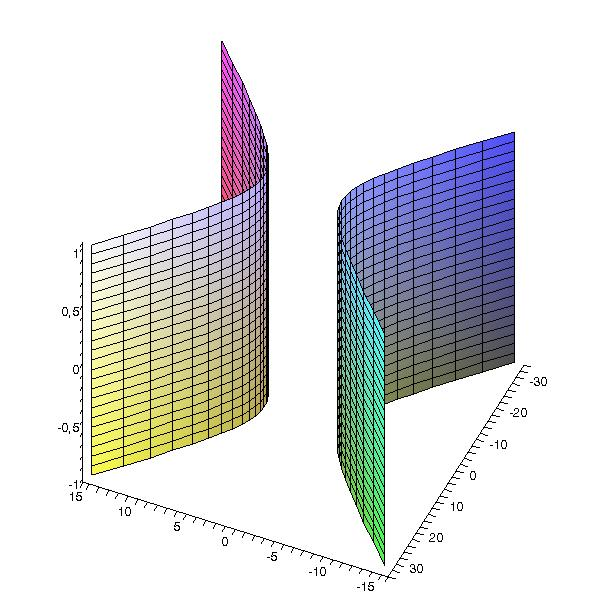 Graphe 3D cylindre hyperboloïque, créé avec Maple 9